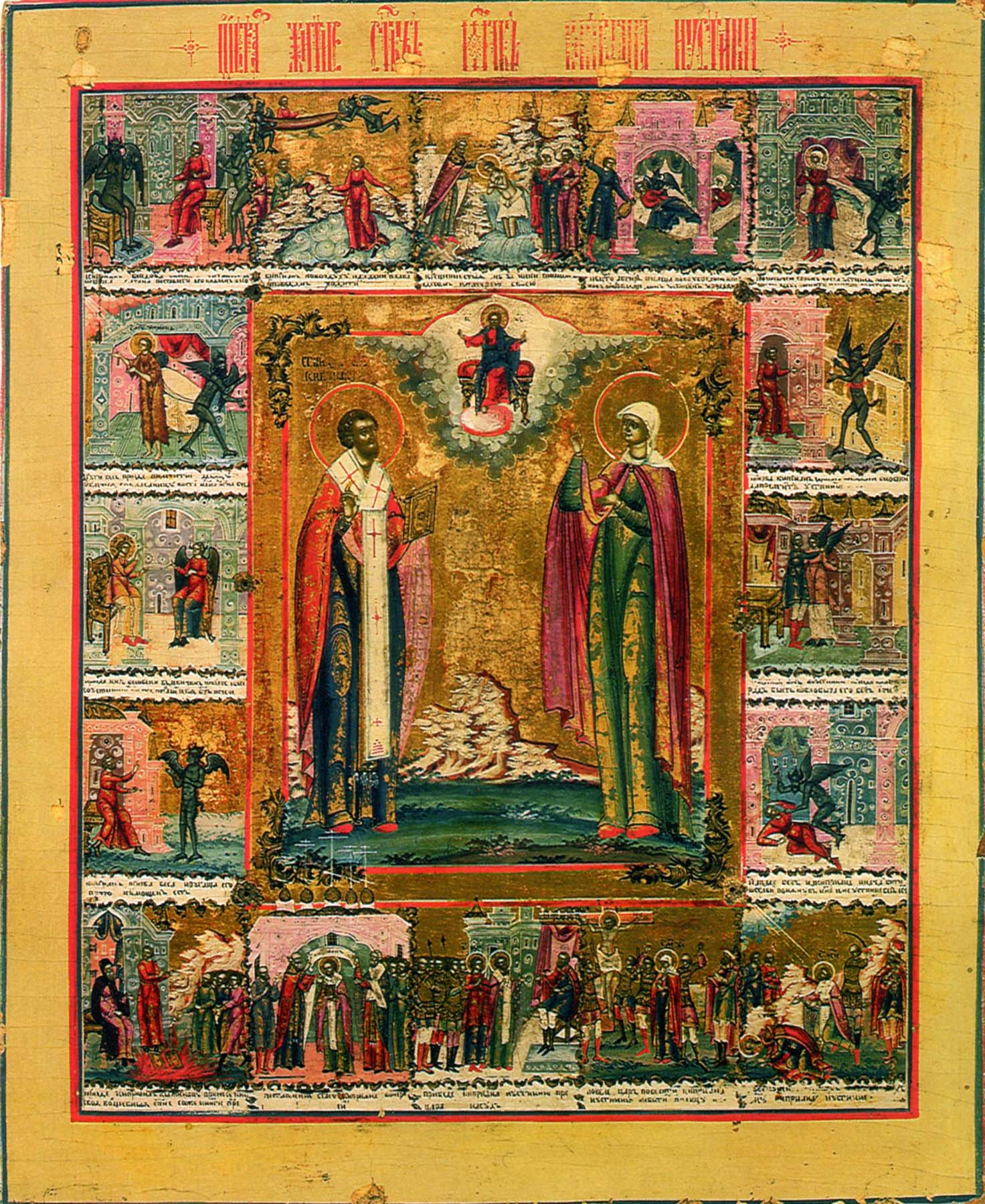 Мученики Кипріян і Юстина. Ікона з життям, кінець XVIII ст. Росія.